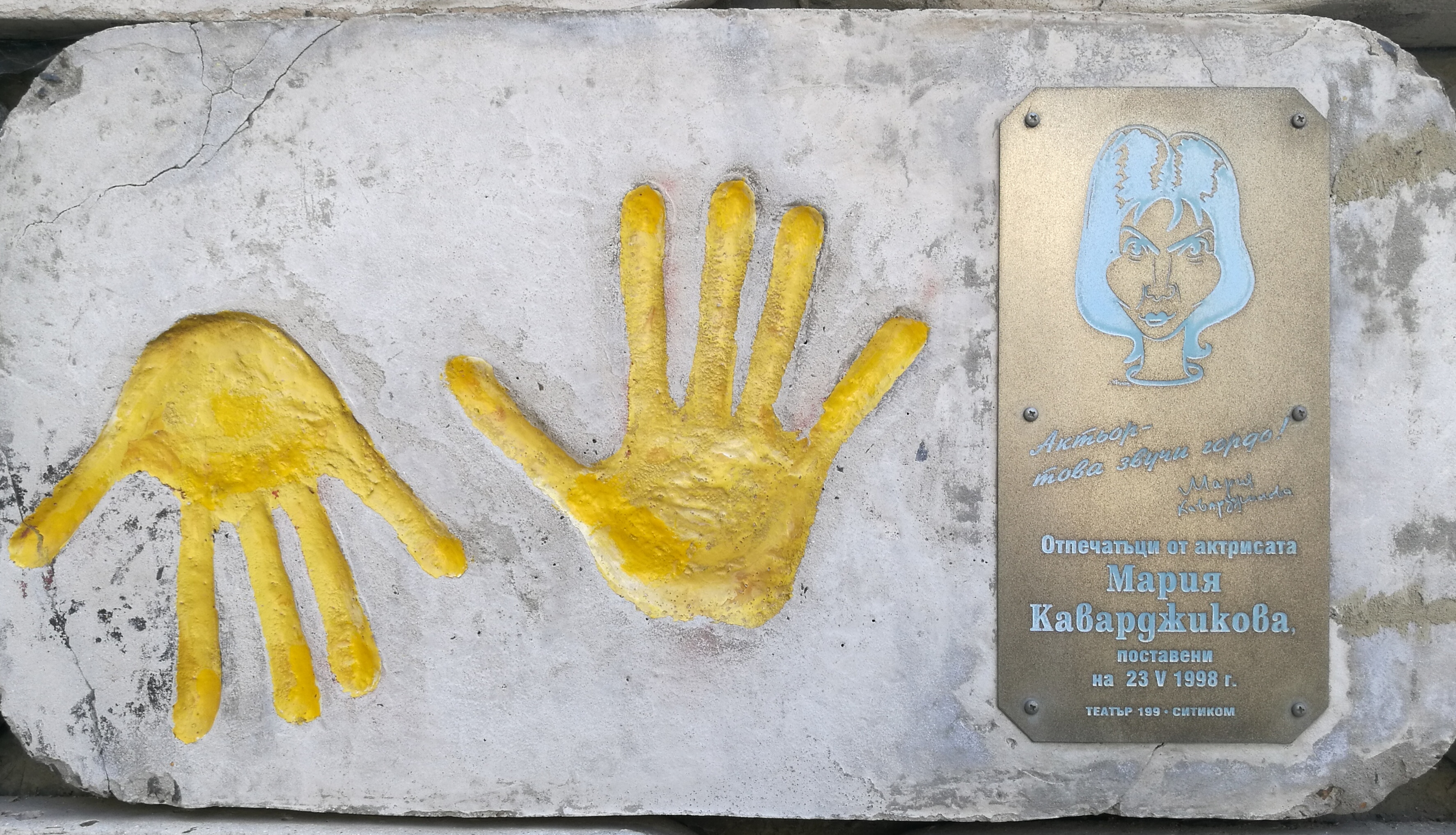 Стената на славата пред Театър 199 - пано с отпечатъци, послание и шарж на Мария Каварджикова.